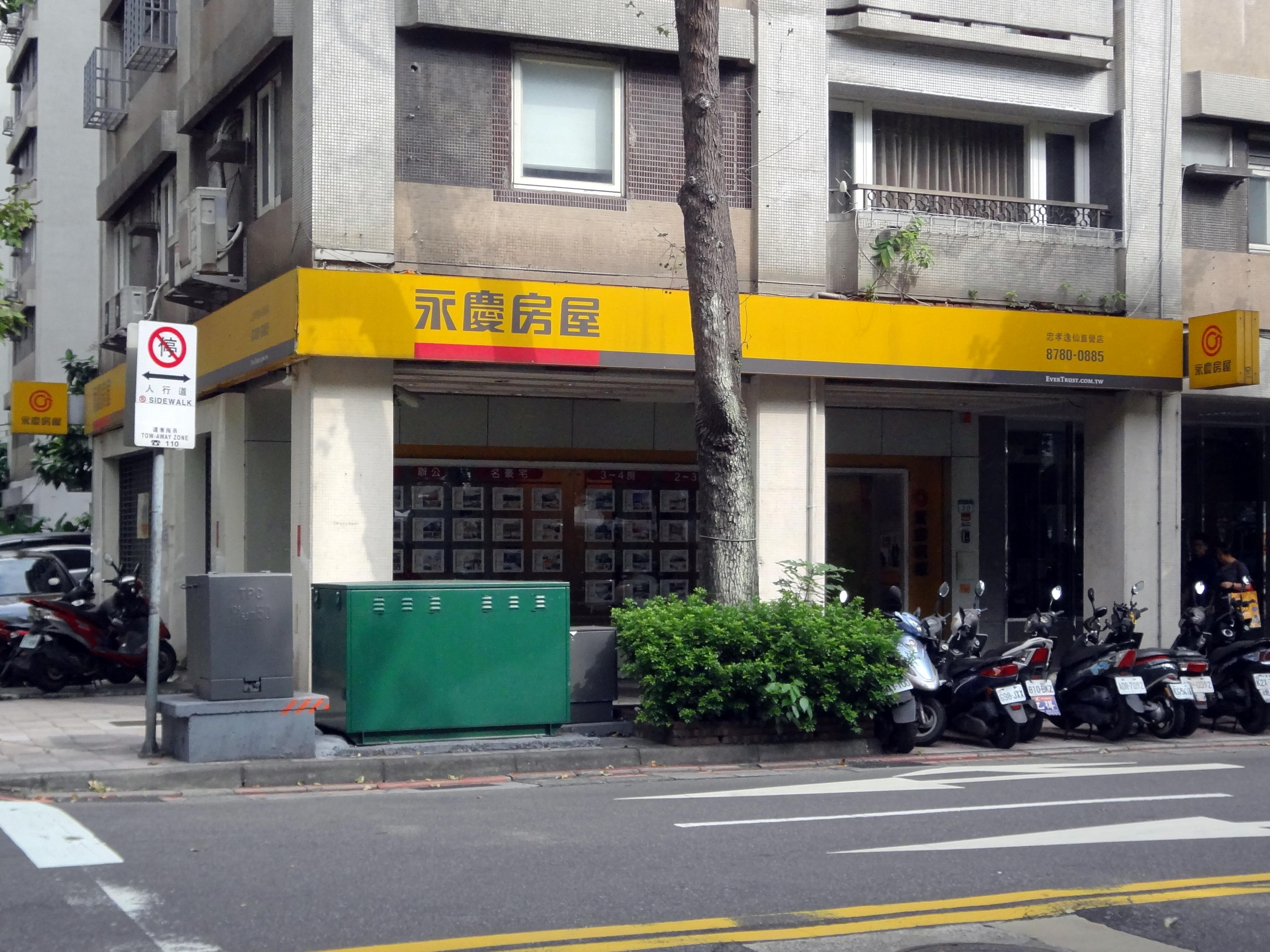 永慶房屋忠孝逸仙直營店，地址：臺北市信義區逸仙路30號1樓。